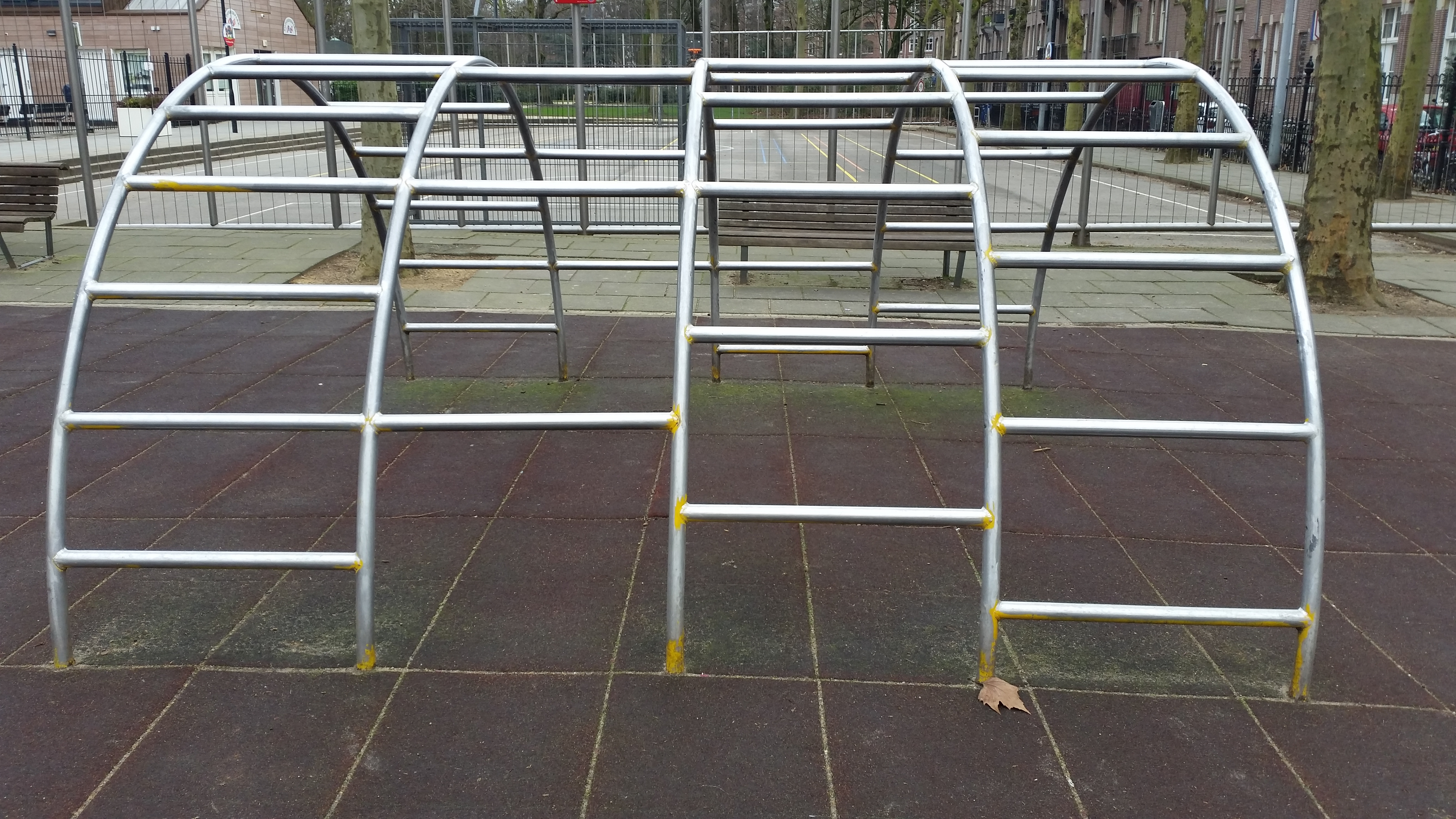 Een Tunnel van Aldo van Eyck in het Bilderdijkpark, Amsterdam-West